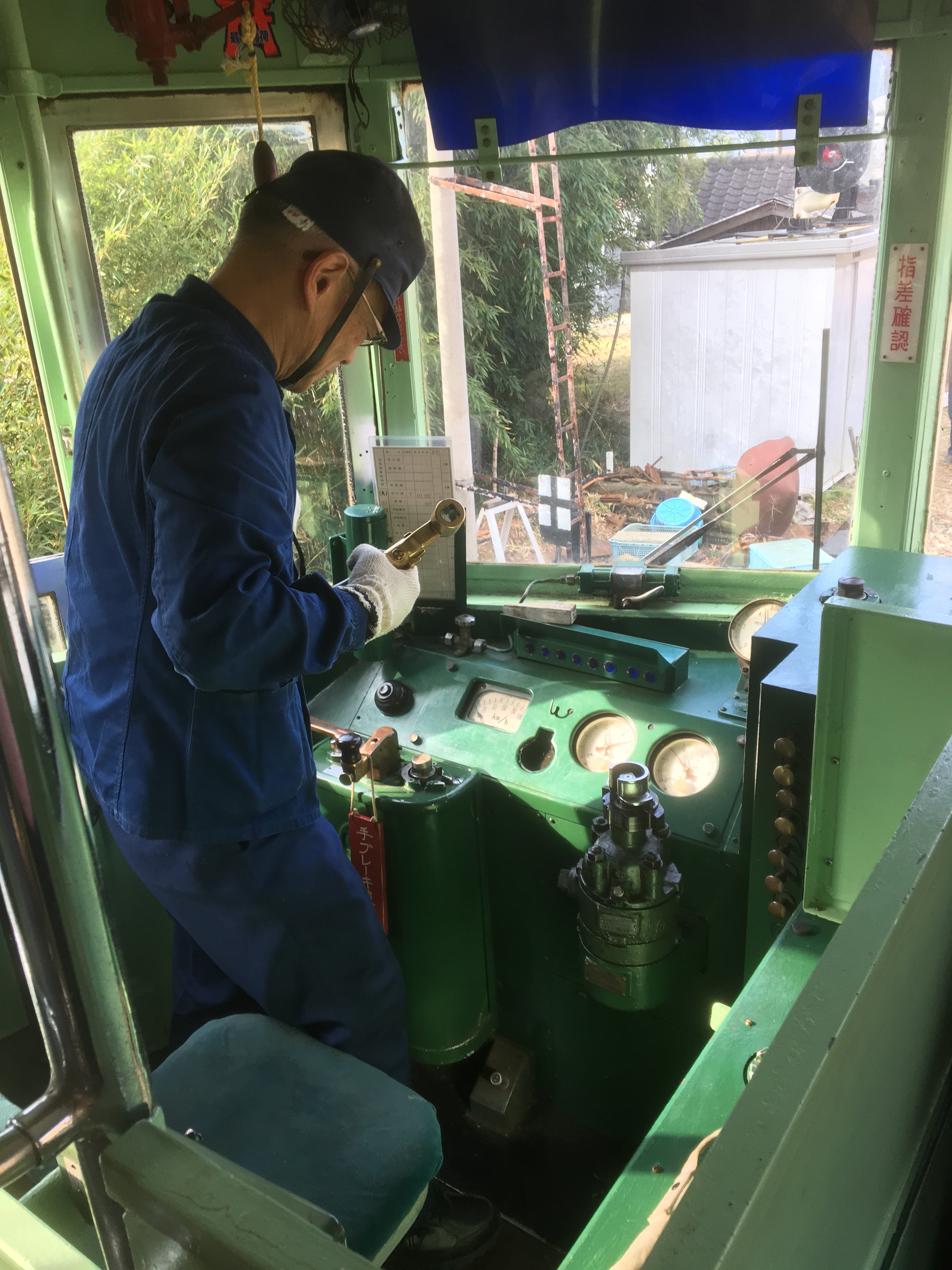 同和鉱業片上鉄道で使用されていたキハ702の運転台 柵原ふれあい鉱山公園にて動態保存 月1回の保存会による車両走行回のときの写真